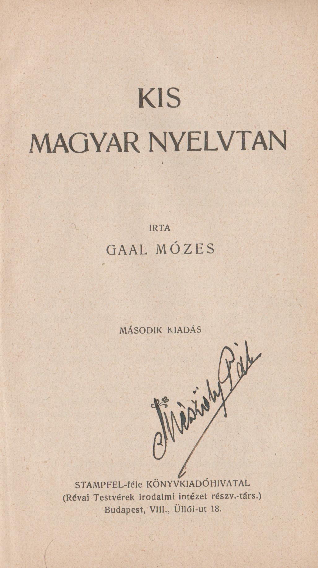 Az adott mű címlapja.